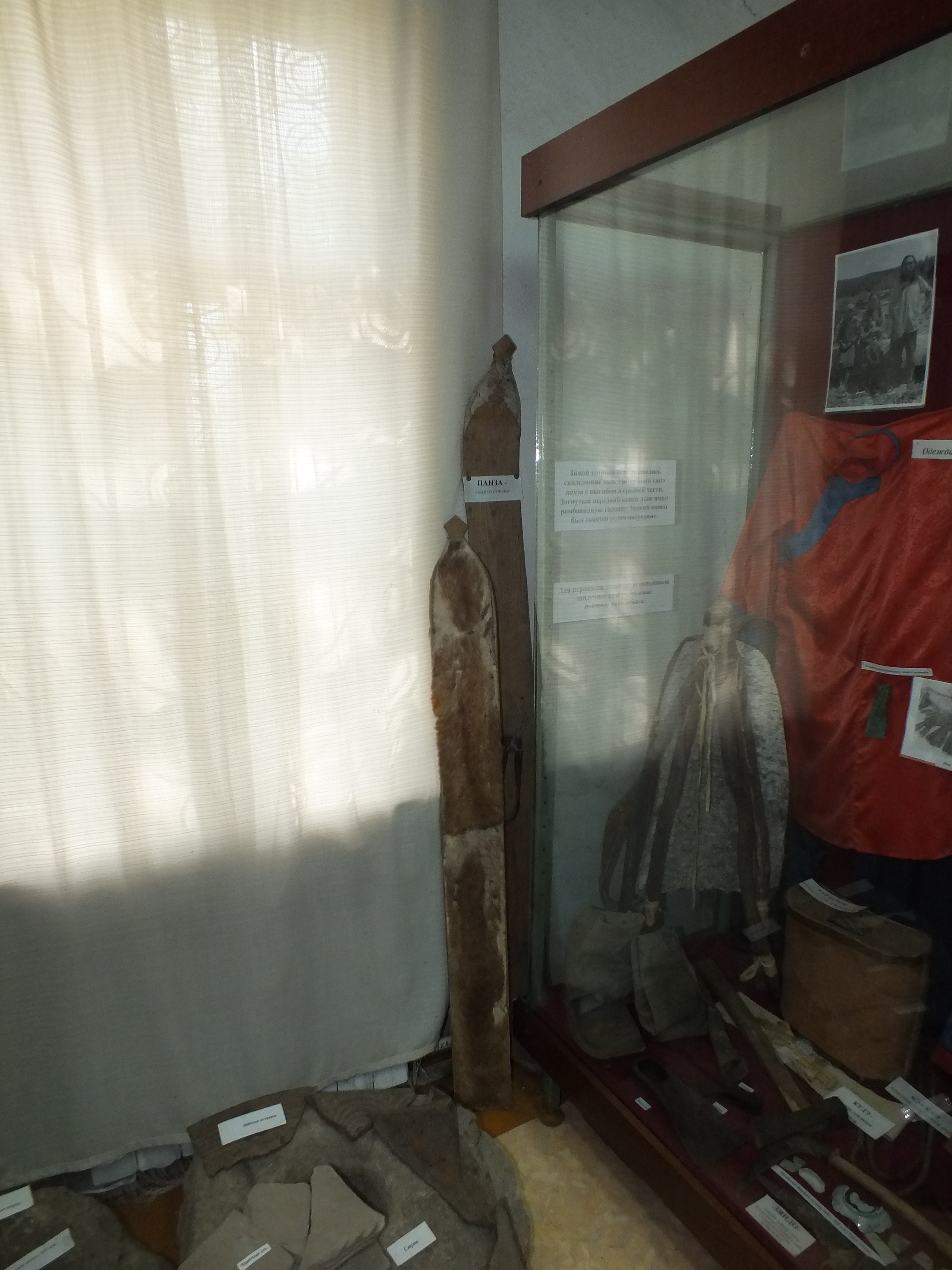 Тазы, малая коренная народность Дальнего Востока России